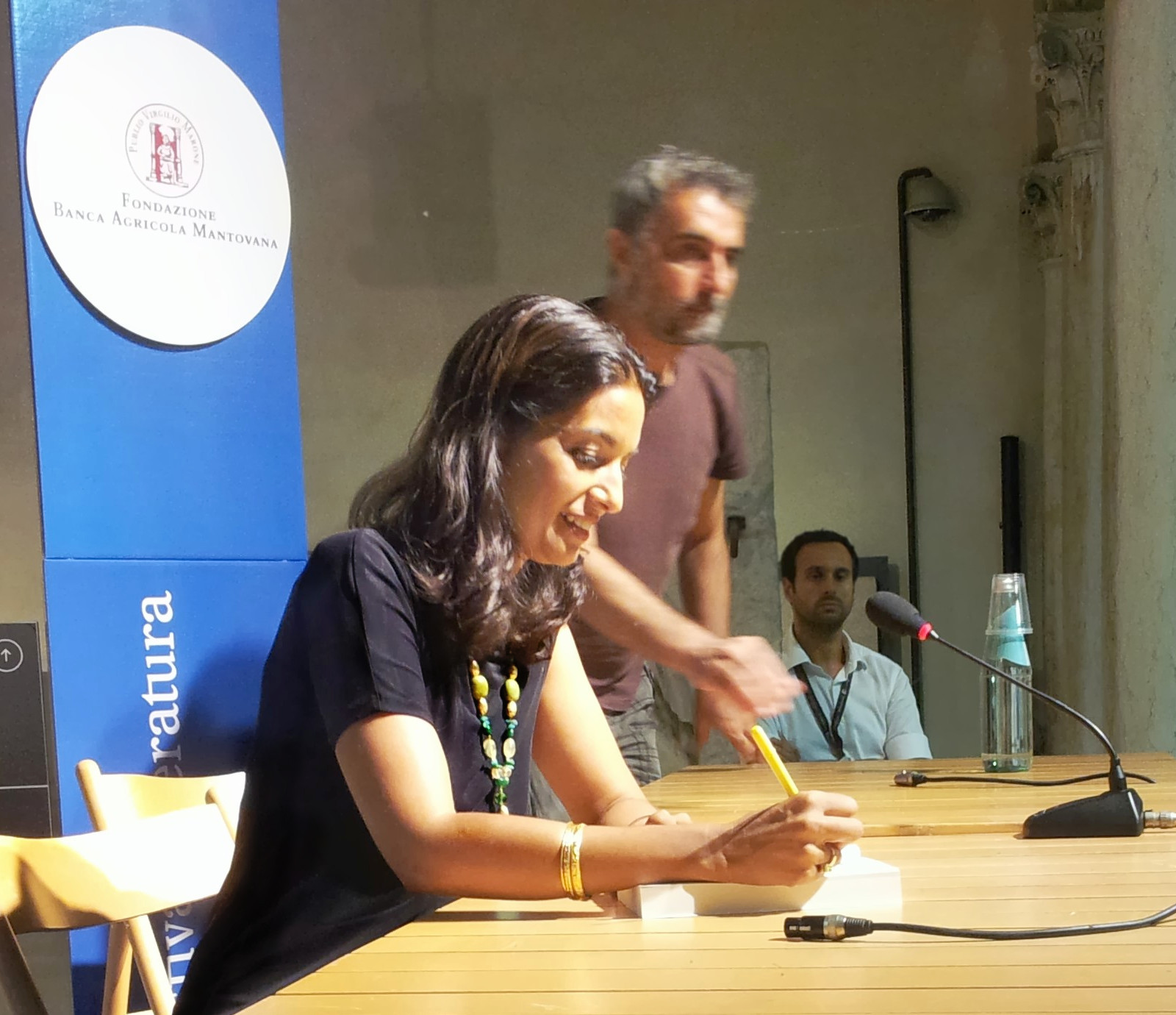 Jhumpa Lahiri al termine dell'evento 124 del 06/09/2013 a Palazzo San Sebastiano a Mantova dove è stata intervistata da Giuseppe Antonelli